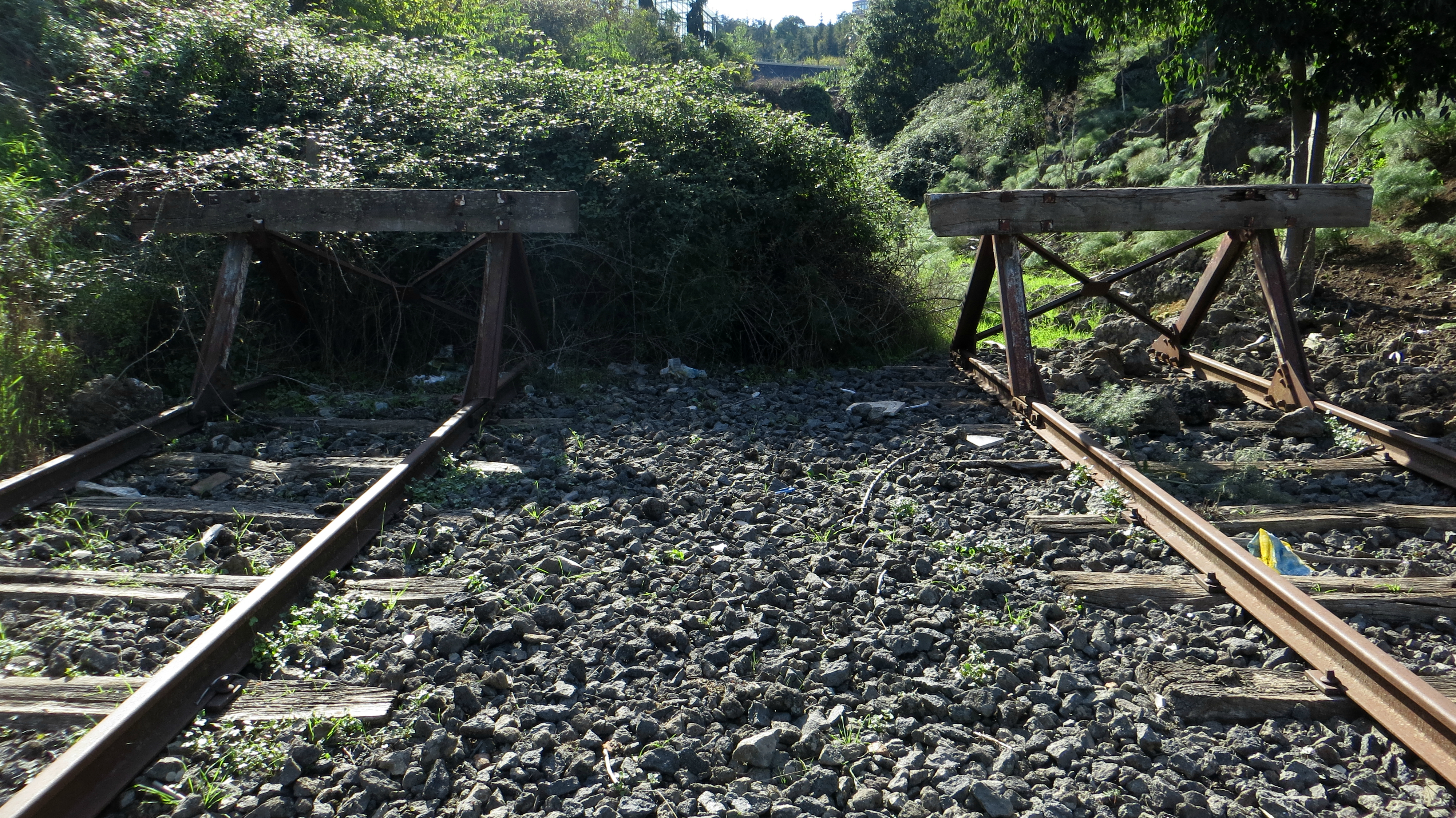 Capolinea Appena dopo la Stazione FS di Randazzo.